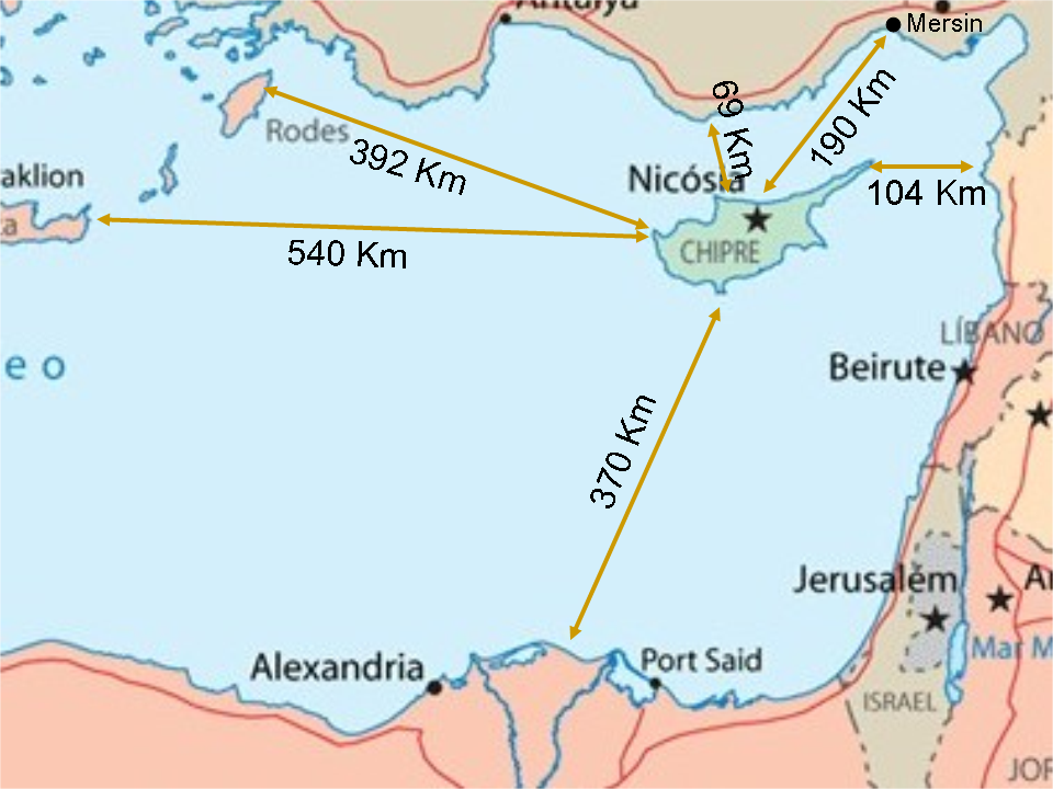 Importancia geopolítica de Chipre.